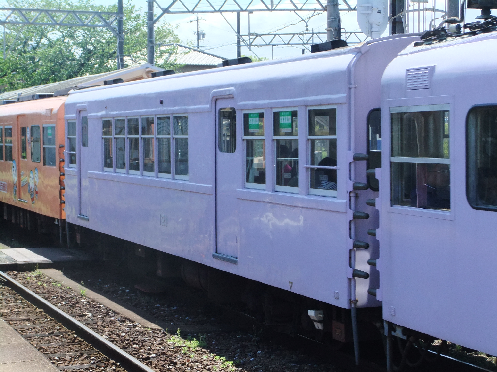 近鉄(四日市あすなろう鉄道) サ121